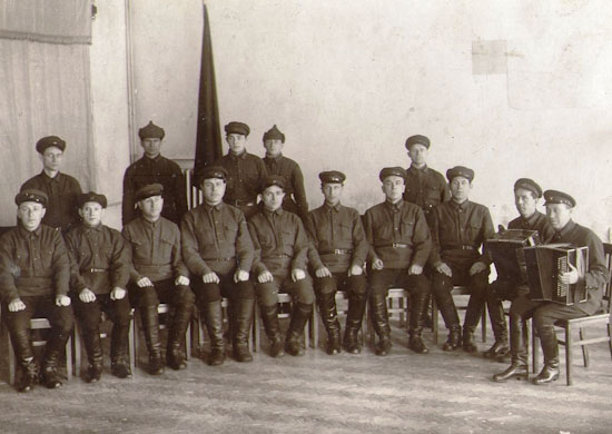 Академический ансамбль песни и пляски имени А.В. Александрова